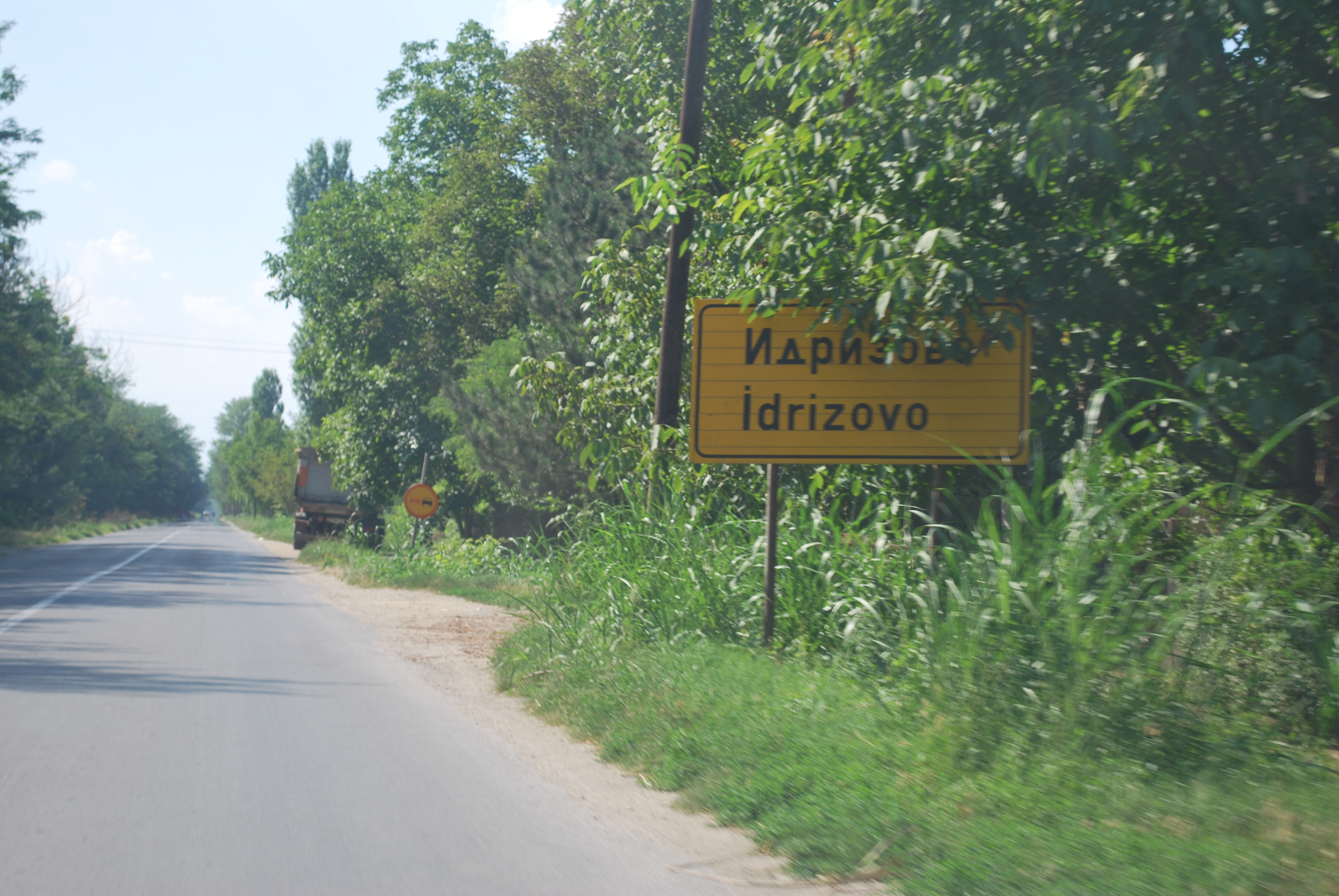 Idrizovo